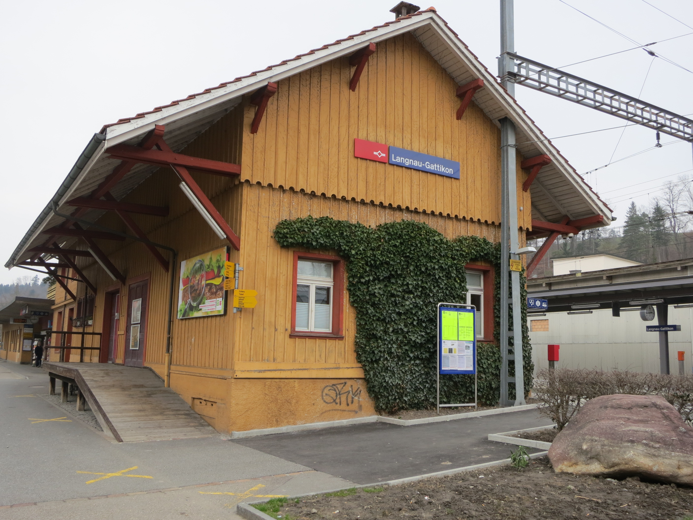 Bahnhof, Langnau am Albis ZH, Schweiz